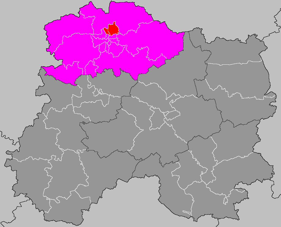 Localisation du canton de Reims-4